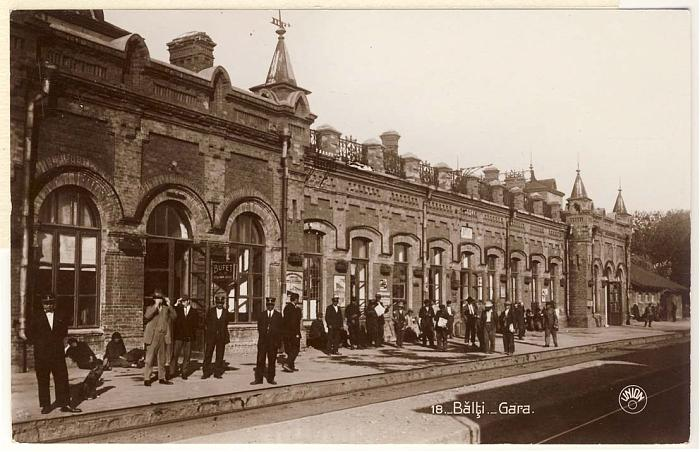 Gara Slobozia-Bălți, în perioda interbelică